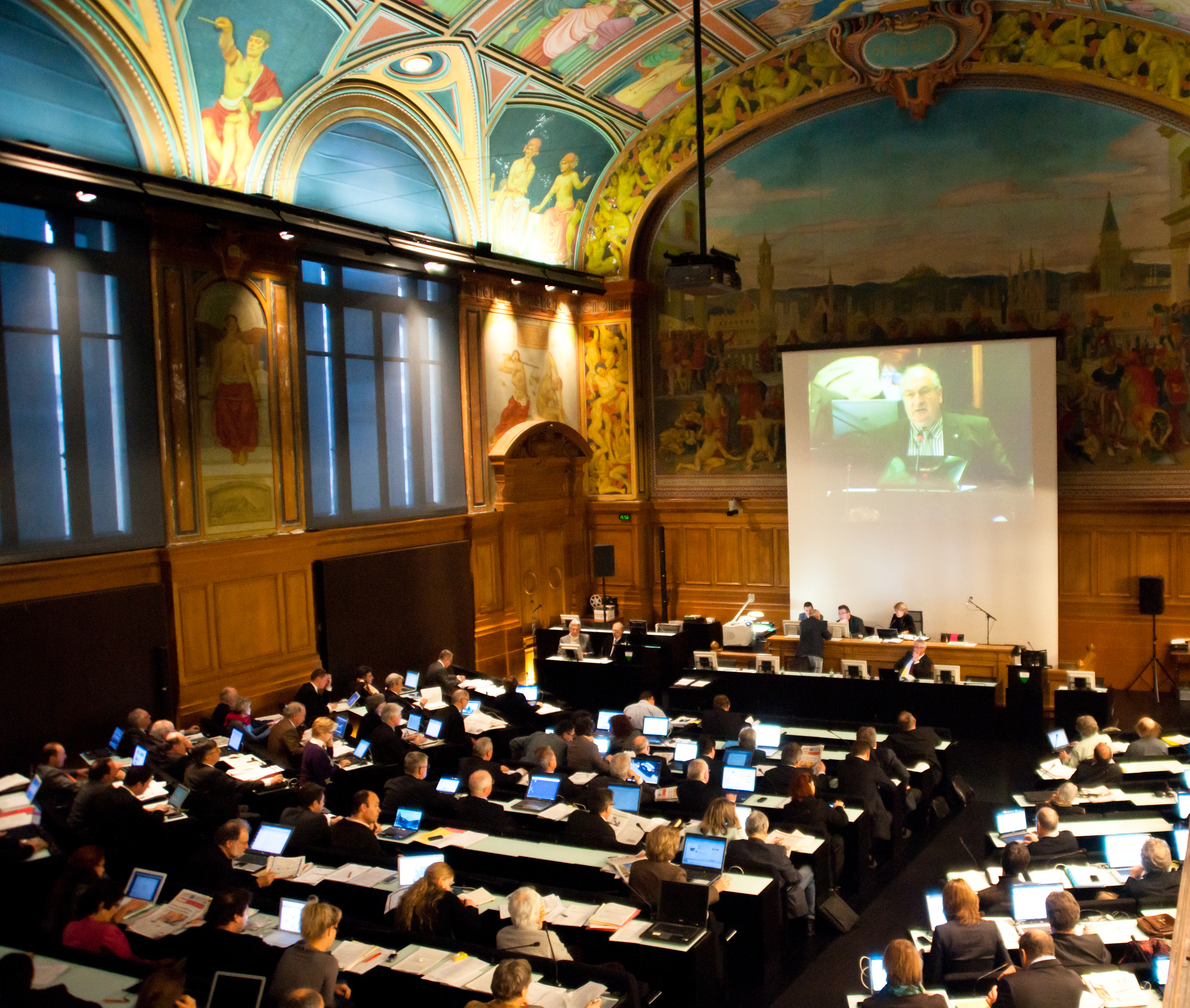 Séance du Grand Conseil de l'État de Vaud.